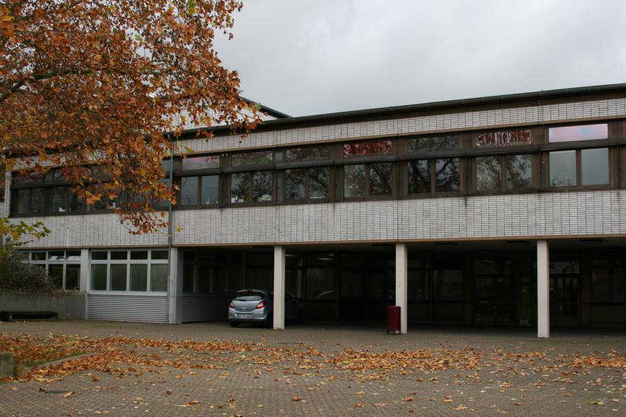 Der Haupteingang des Gymnasium Hochdahl, Erkrath, im Jahr 2007